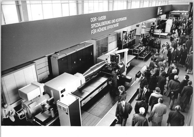 Leipzig, Frühjahrsmesse, Hochleistungs-Universal-Drehmaschine ADN-ZB Lehmann 16-3-82 Leipzig-Frühjahrsmesse 82: In der Branche Werkzeugmaschinen und Werkzeuge wird der Bereich Sondermaschinen in einer Fachgruppe zusammengefaßt. Der VEB Maschinenfabrik Meuselwitz zeigt eine Hochleistungs-Universal-Drehmaschine.